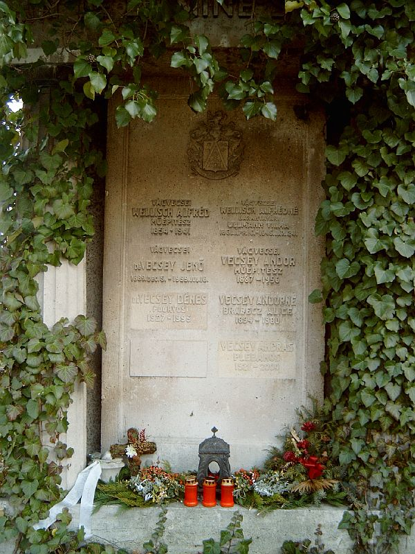 Wellisch Alfréd (Pest, 1854. máj. 6. – Bp., 1941. dec. 16.) építész sírja Budapesten. Farkasréti temető: 43-1. sírbolt.